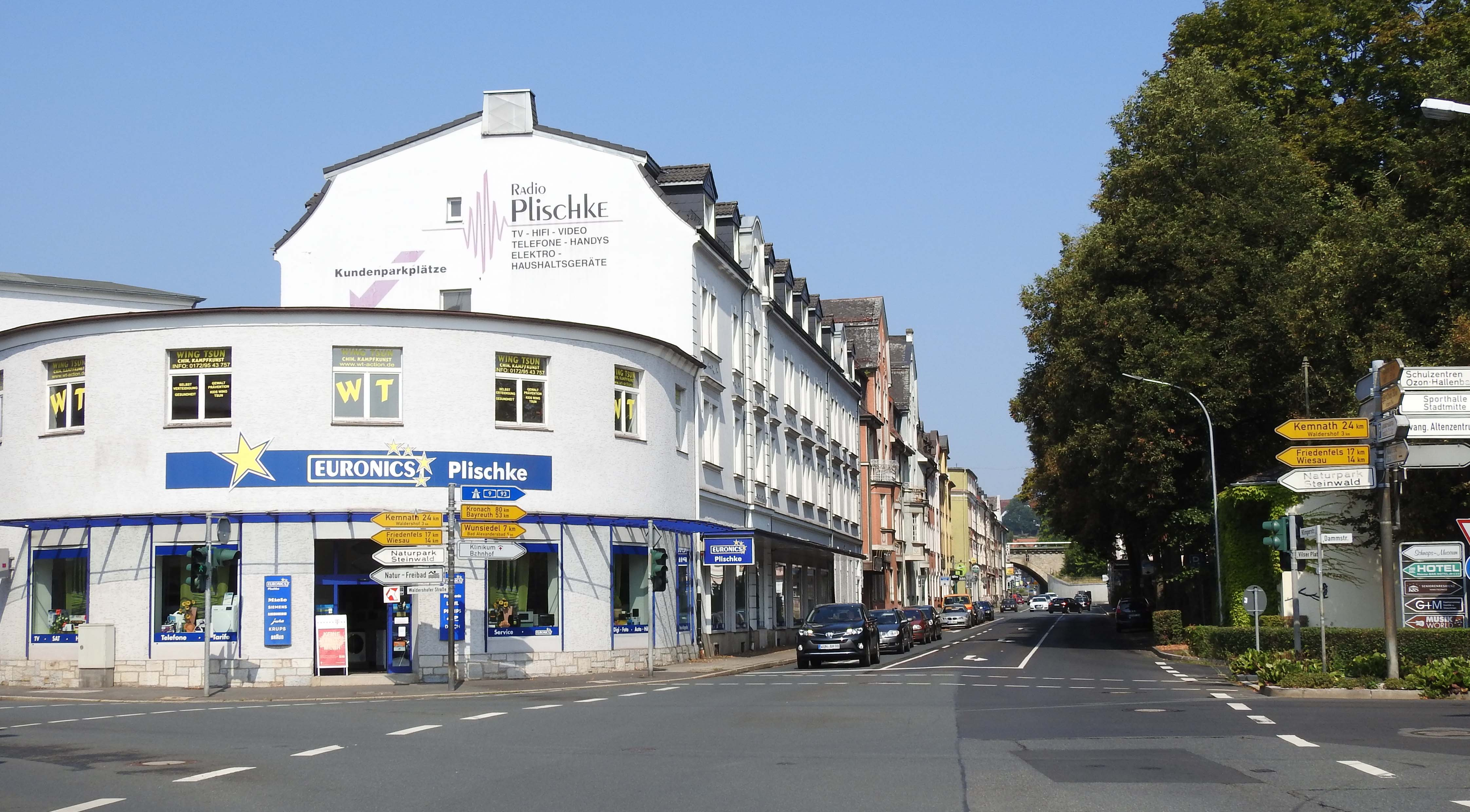 Ensemble Klingerstraße in Marktredwitz